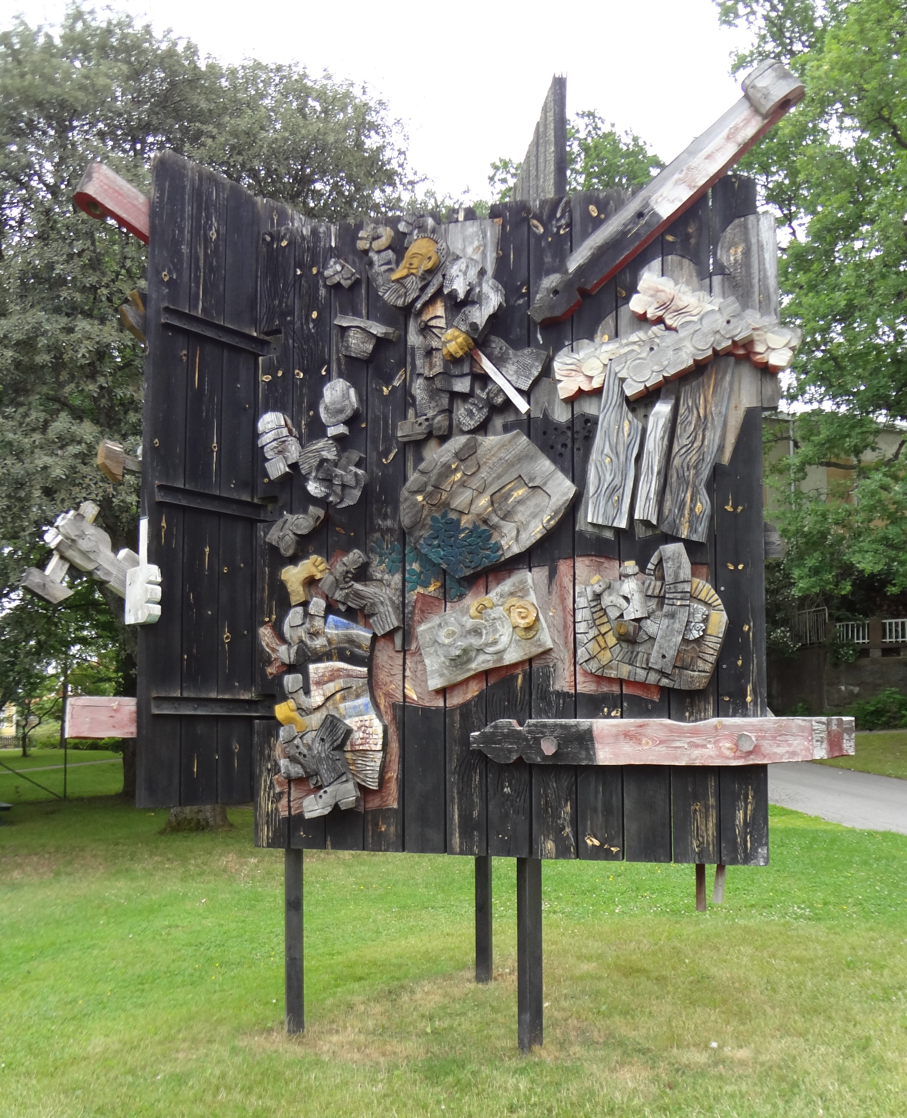 Tre portar, Vide Jansson, 1978, trä, Parken Zoo, Eskilstuna